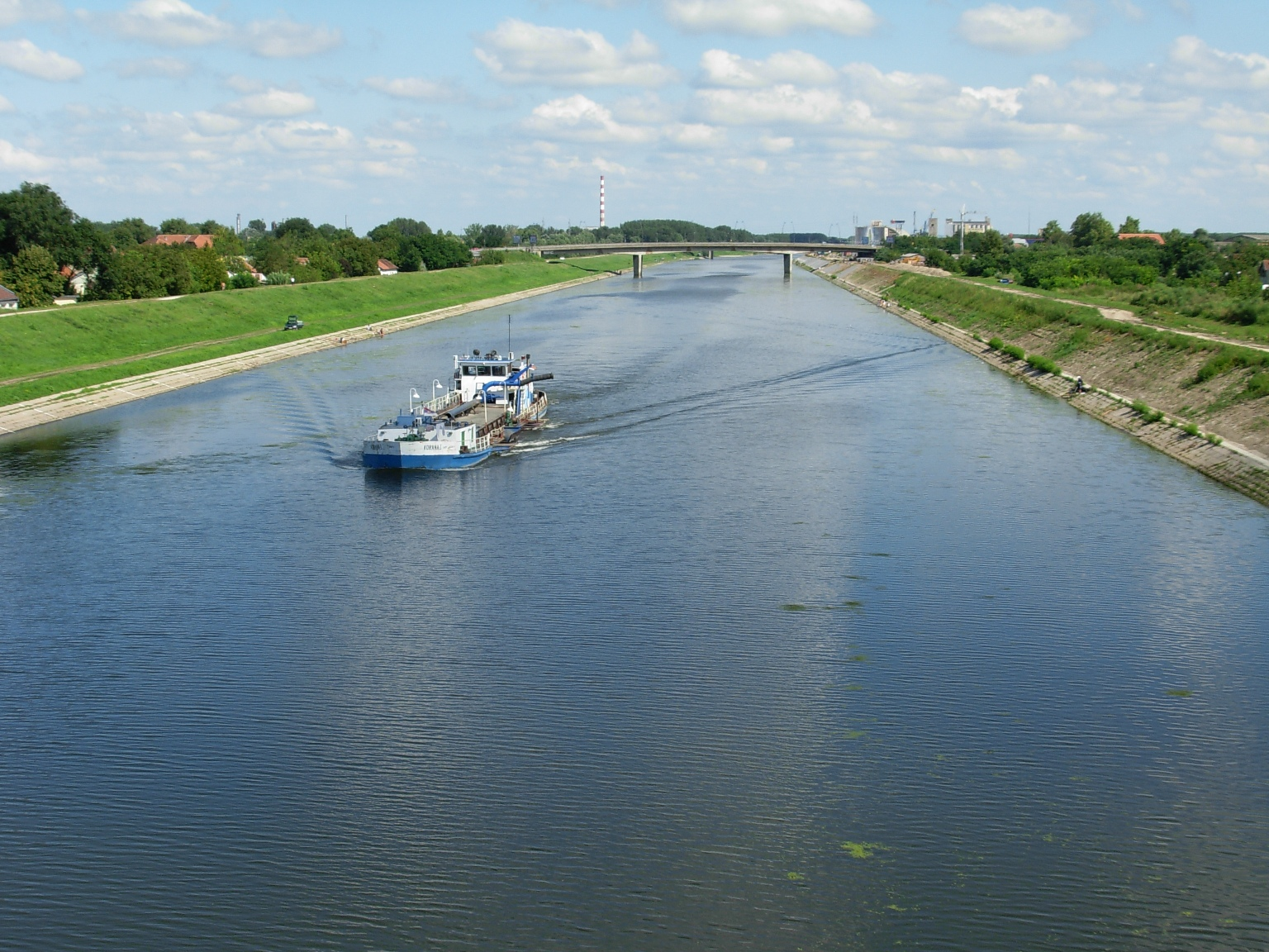 Kanal Dunav-Tisa-Dunav kod Novog Sada.